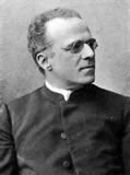 Peter Gleitsmann (1855-1929), Pfarrer, Bayerischer Landtags- und Deutscher Reichstagsabgeordneter